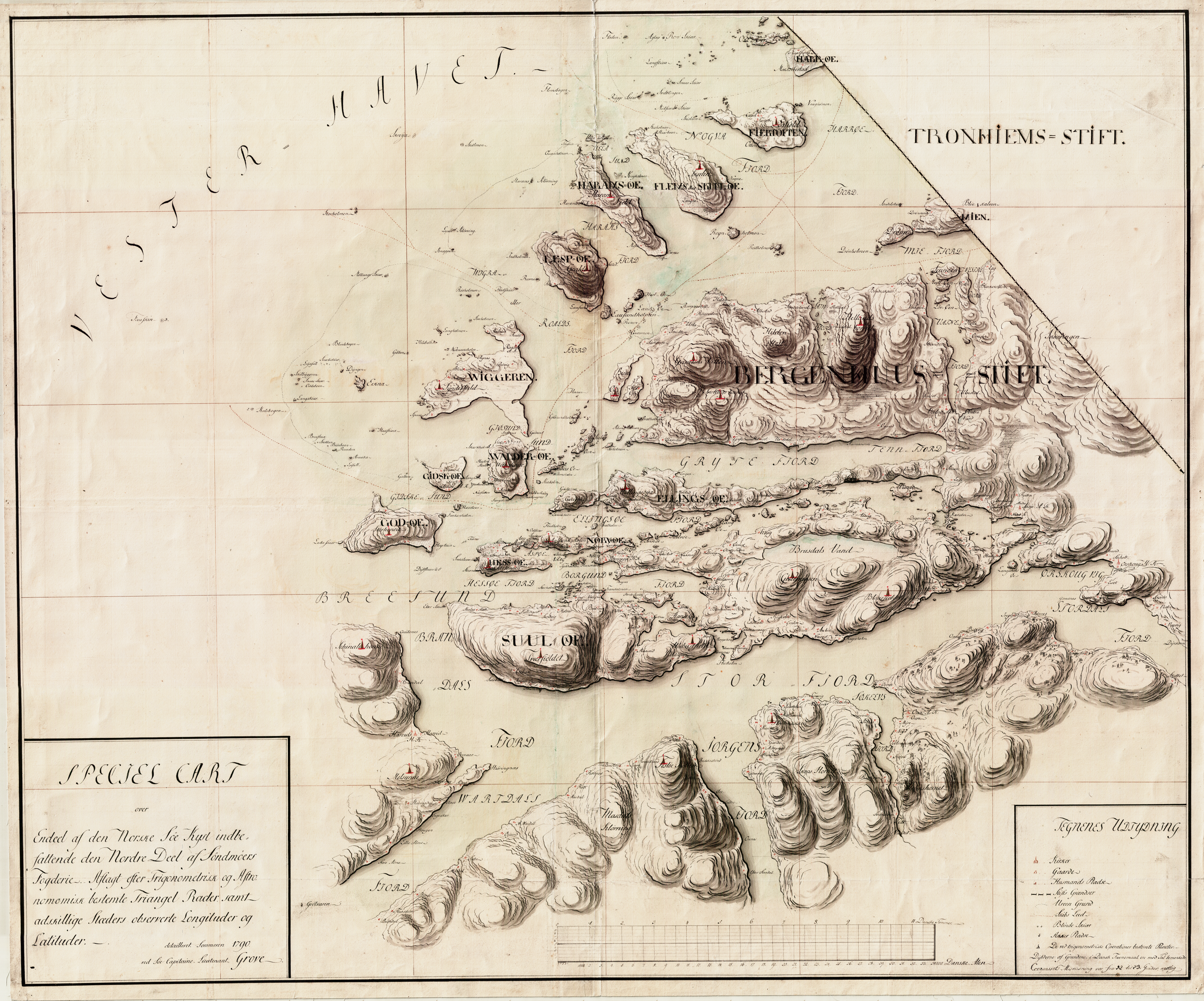 Sjøkart over Sunnmøre, fra Vartdalsfjorden til Fjørtoft, fra 1790. Håndtegnet av Carl Friderich Grove i omtrentlig målestokk 1:70 000. Original kartstørrelse ca 99 cm x 82 cm. Et eksemplar befinner seg hos Statens kartverk Sjø i Stavanger.